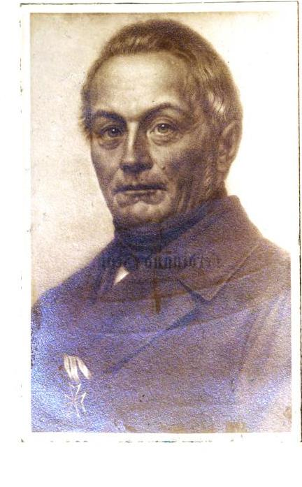 Porttrait of Ferdinand Zenker, scan of frontispiece from his An meine Kinder: Erinnerungen aus meinem Leben. Niedergeschrieben in den Jahren 1862 und 1863 von Ferdinand Zenker. Als Manuskript zum Druck befördert von seinen Kindern. Berlin: Joseph Royer 1864